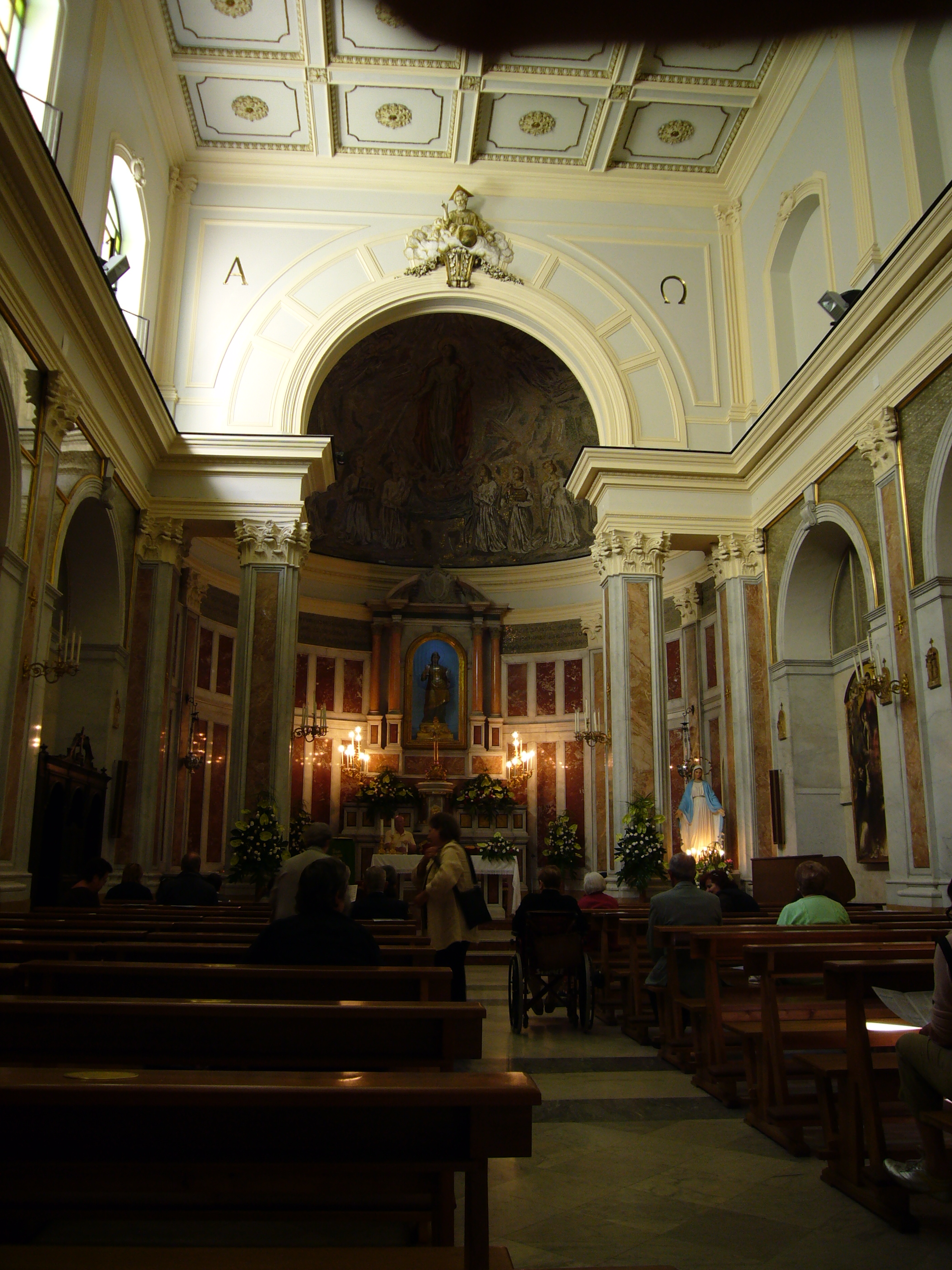 Napoli, Santa Lucia a mare - interno; sopra l'altare la statua di Santa Lucia da Nicolò Fumo